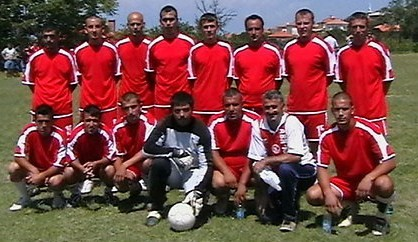 ФК "Граничар" - Туховища